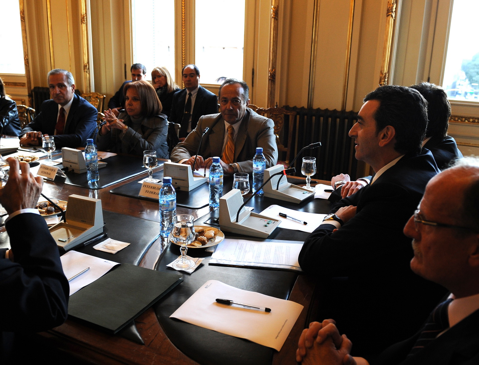 El ministro del Interior, Florencio Randazzo, junto a referentes políticos del interior en el Salón Norte de Casa Rosada.